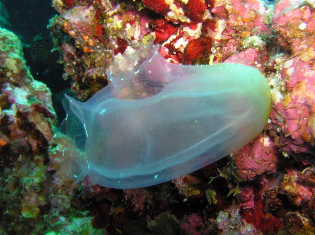 Sea Squirt, Egypt April 2007